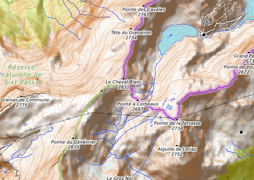 carte réalisée sur umap This map may be incomplete, and may contain errors. Don't rely solely on it for navigation.